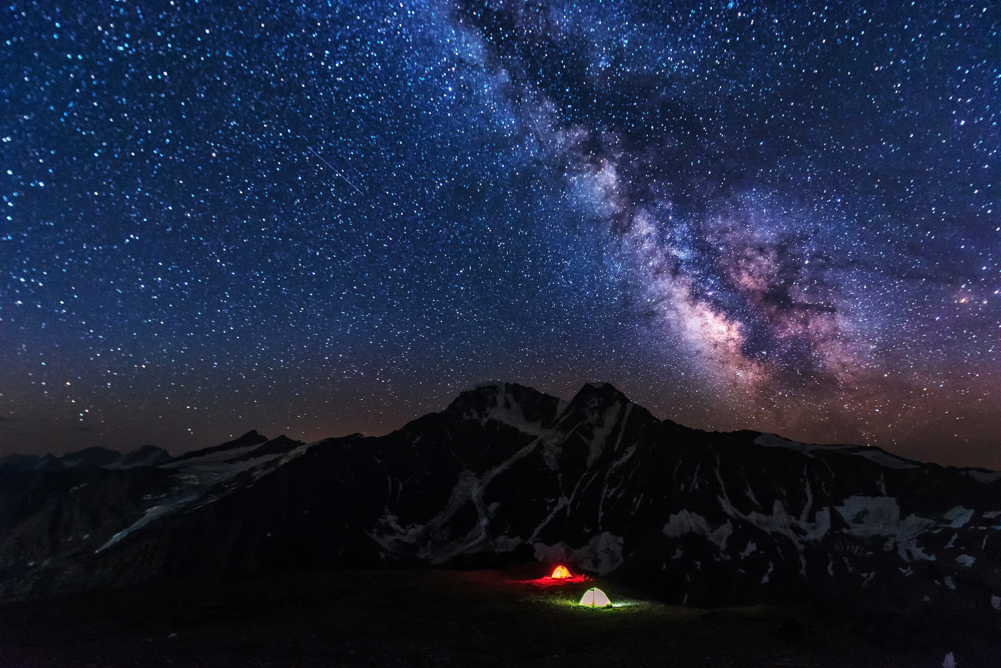 Приэльбрусье: Центральный Кавказ, среднегорная и высокогорная зоны (1400 - 5642 м) в пределах Главного Кавказского и Бокового хребтов. Территория национального парка занимает верховья рр. Малки и Баксана. С северо-запада национальный парк граничит с Карачаево-Черкесской Республикой, с запада - со Ставропольским краем. На юго-западе граница национального парка совпадает с государственной границей между Россией и Грузией. С юга и востока граница проходит по территории Кабардино-Балкарской Республики, соответственно по водоразделу между реками Баксан и Чегем. Расположен Национальный парк в 90 км к западу от г. Нальчика в высокогорной части бассейнов рек Баксана и Малки, в пределах Главного Кавказского (северный склон), Бокового и Передового (южный склон ) хребтов, Зольский район, Кабардино-Балкария This image is related to the protected area of Russia number 0700010